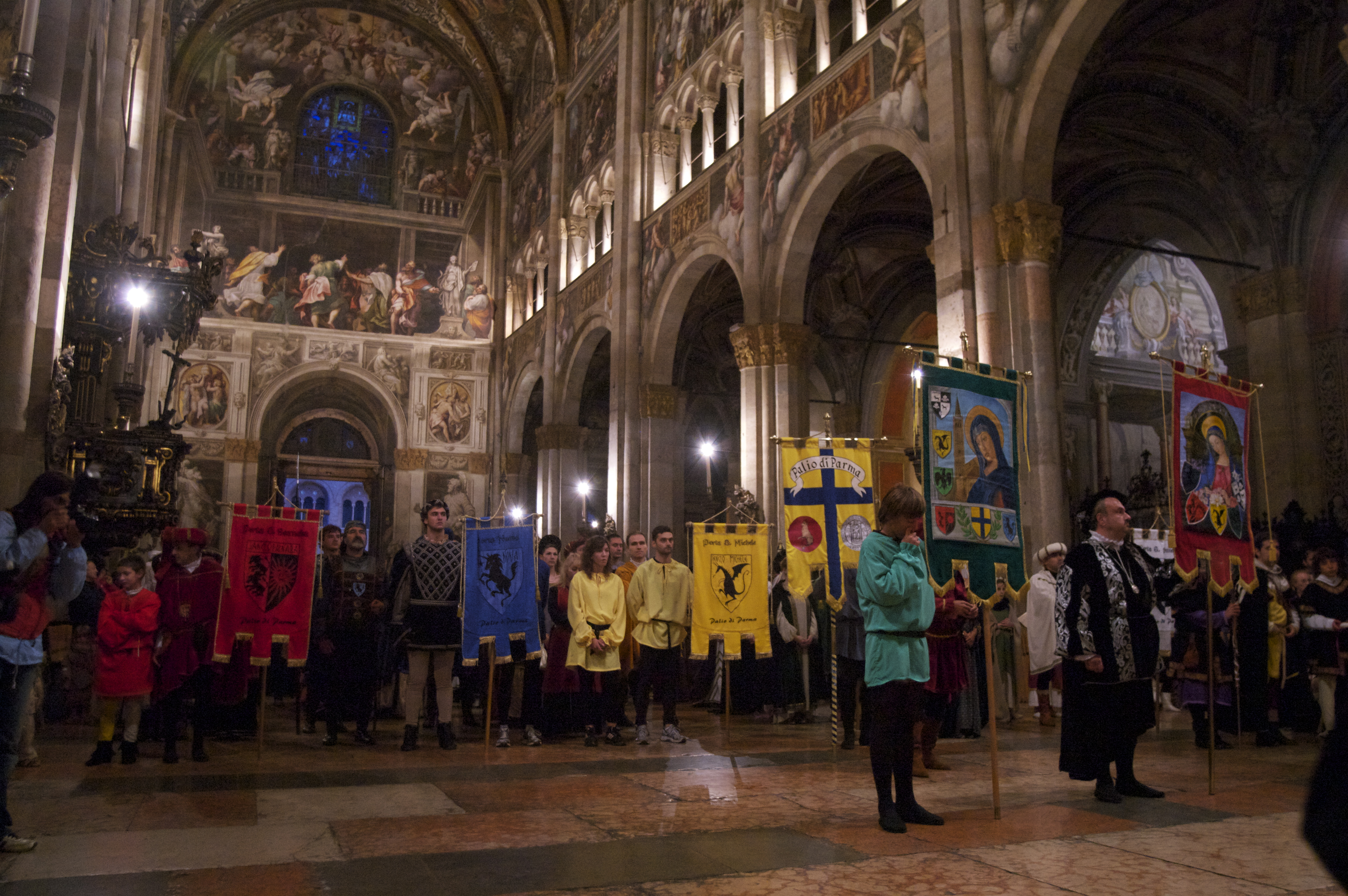 Cerimonia di benedizione in Duomo del Palio